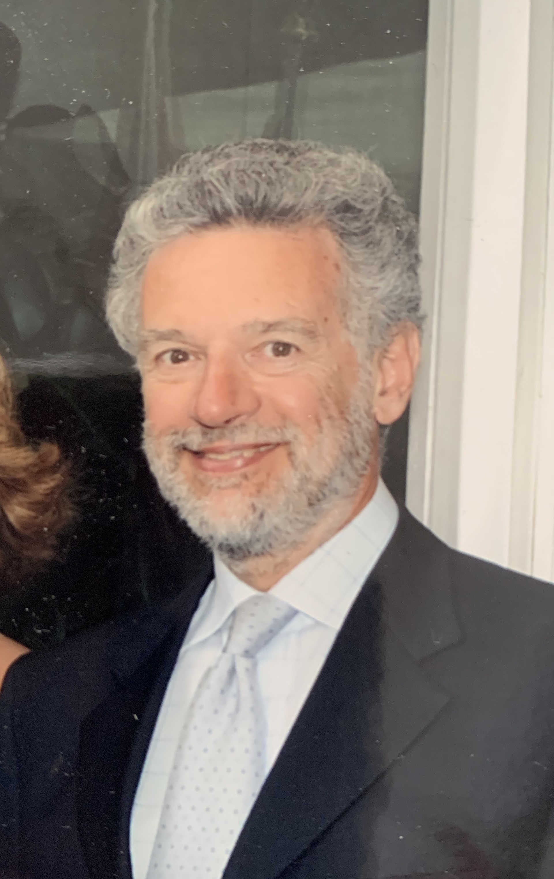 Paolo Gallarati